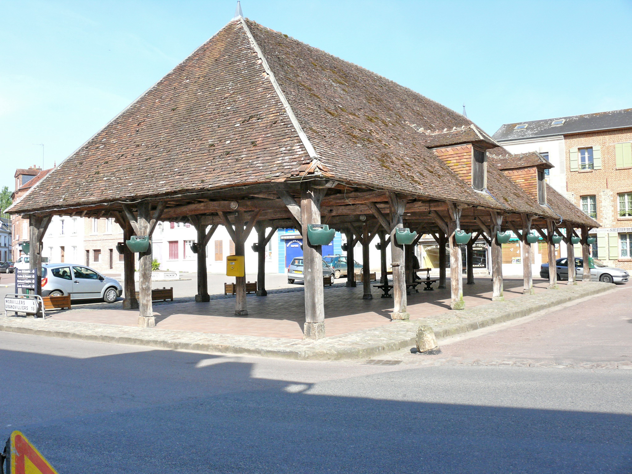 La Halle de Songeons (Oise, Picardie, France)